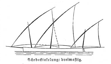 Schebeckentakelung, drei-mastig